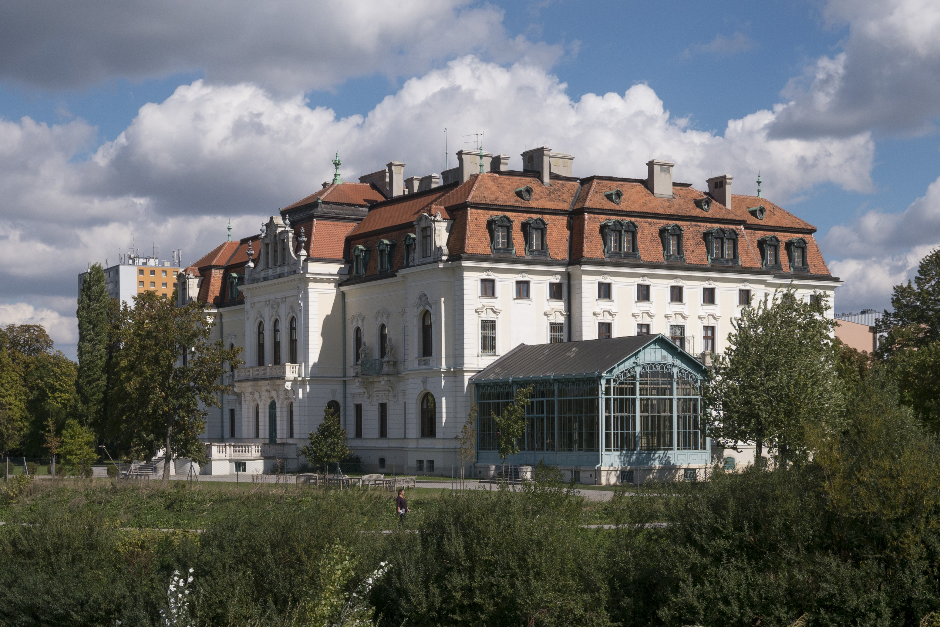 Schloß Kettenhof, Bezirksgericht, Bundesjustizschule